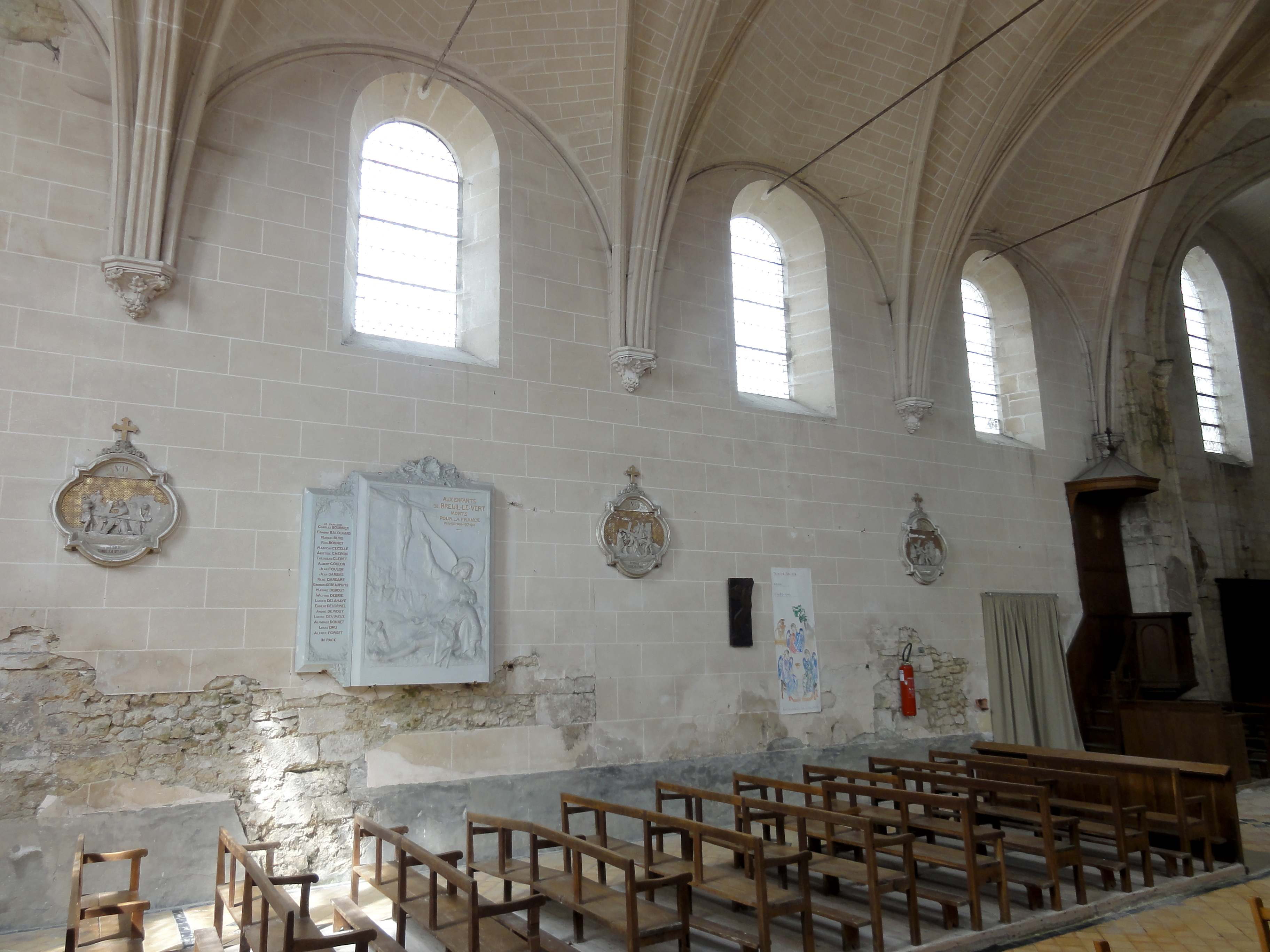 Intérieur de l'église - voir titre.